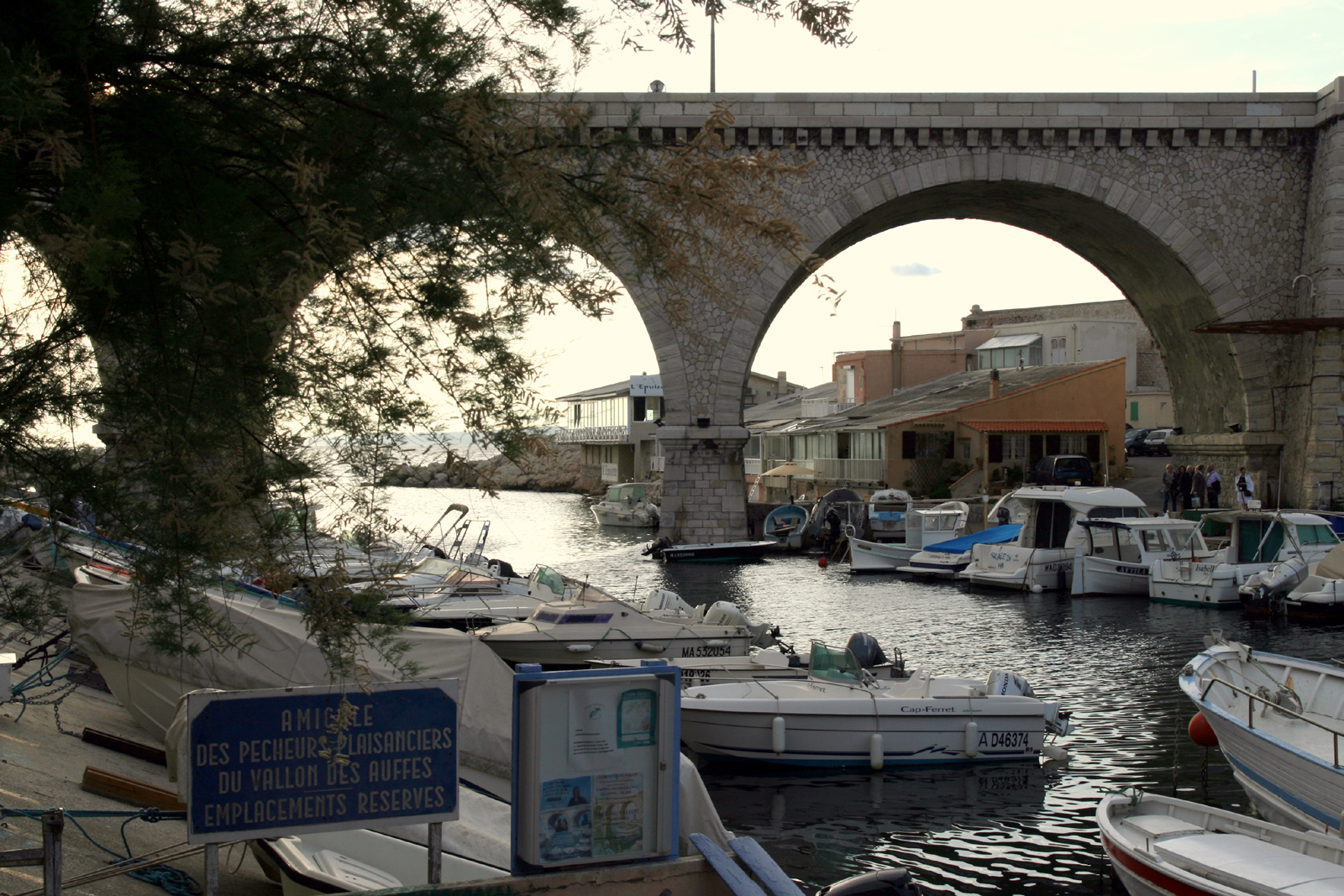 Vallon des Auffes à Marseilles